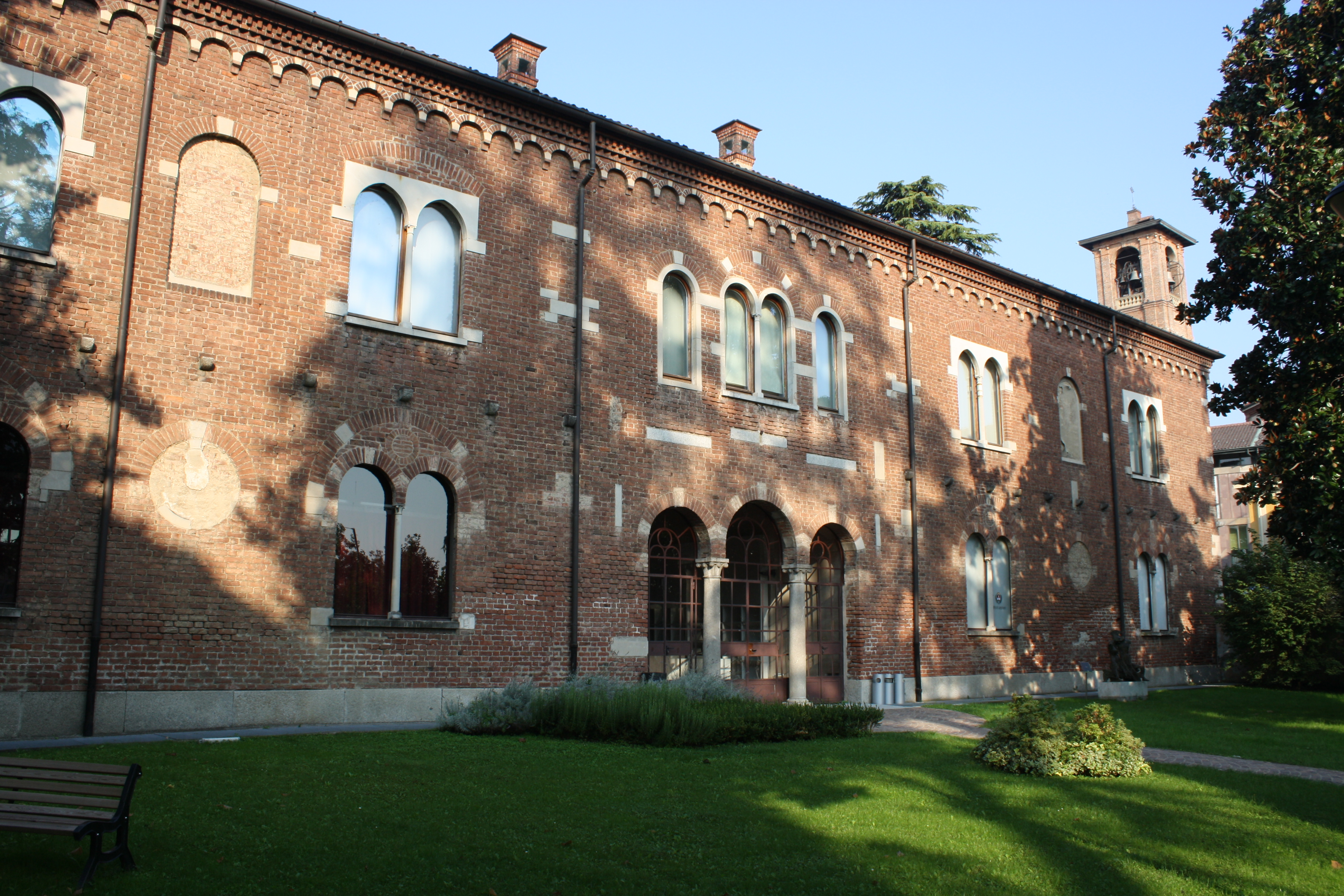 Palazzo Leone da Perego a Legnano: la facciata This is a photo of a monument which is part of cultural heritage of Italy.